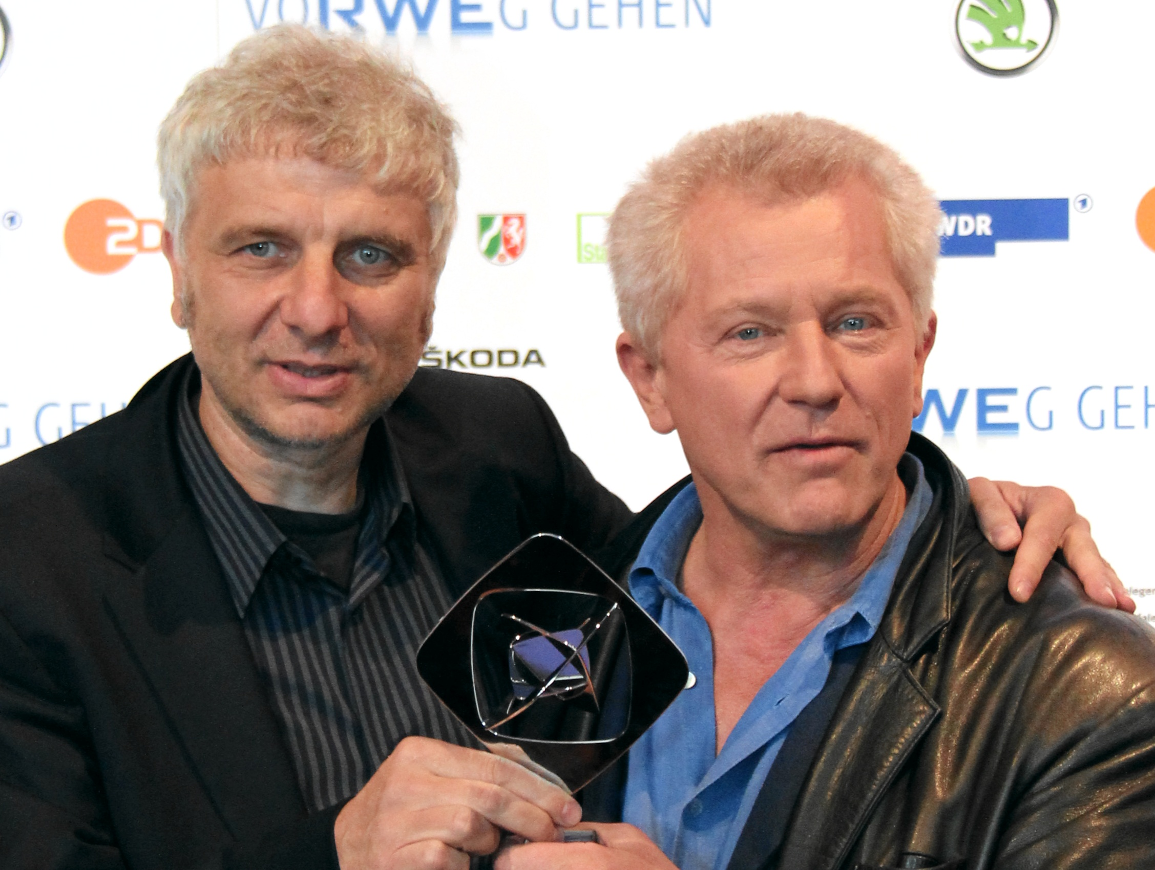 Grimme-Preisträger Udo Wachtveitl und Miroslav Nemec bei der Verleihung 2011